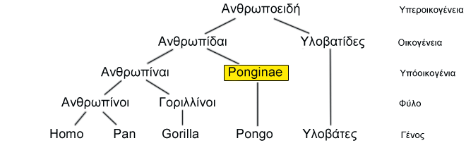 Το φυλογενετικό δέντρο των Ανθρωποειδών